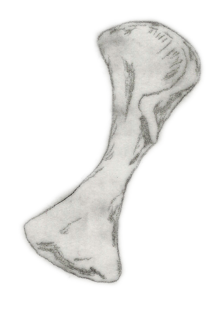 Illustration of a fossil of Plateosauravus